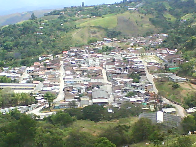 Foto tomada de lo alto de una montaña.